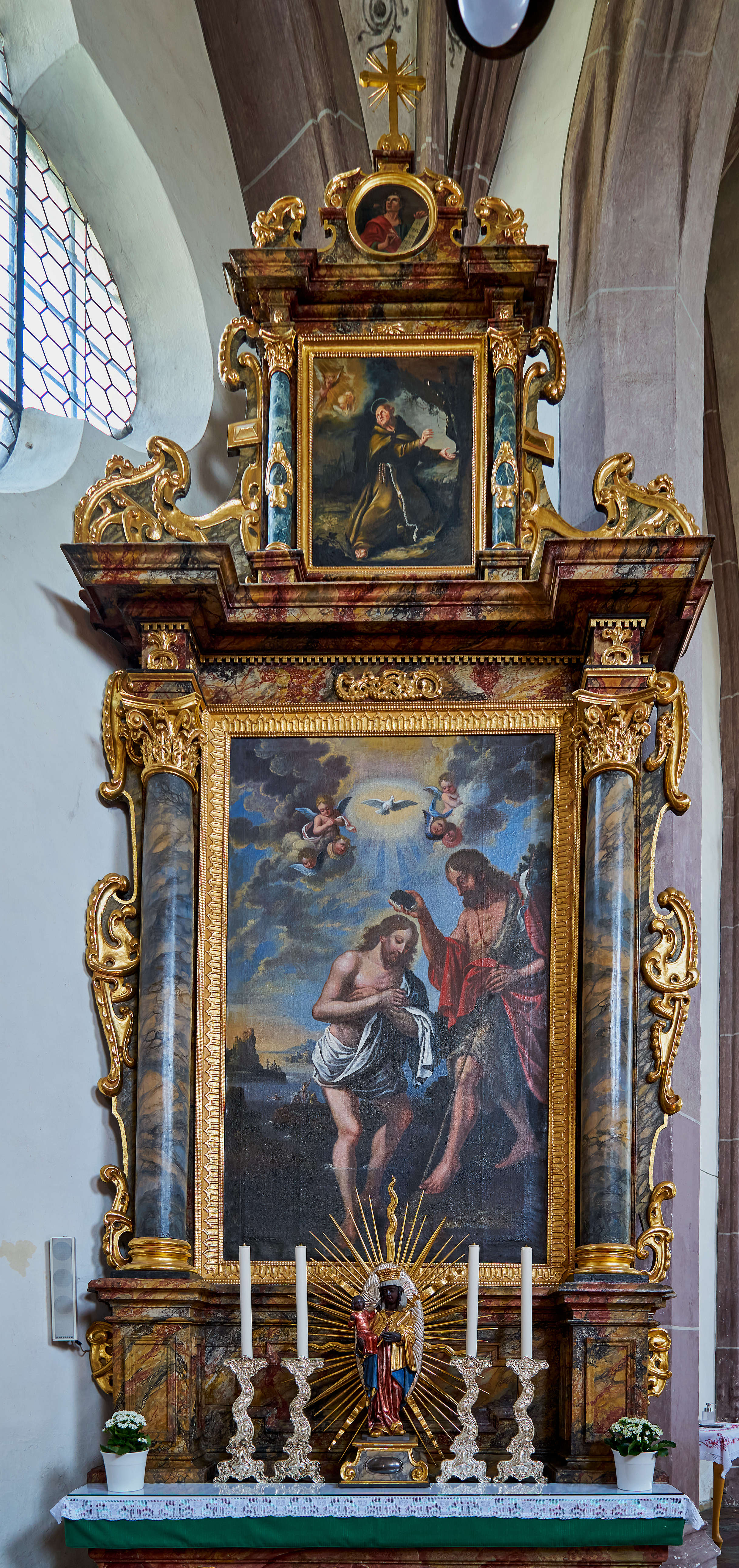 Katholische Pfarrkirche Mariä Himmelfahrt Kirchdorf am Inn, linker Seitenaltar